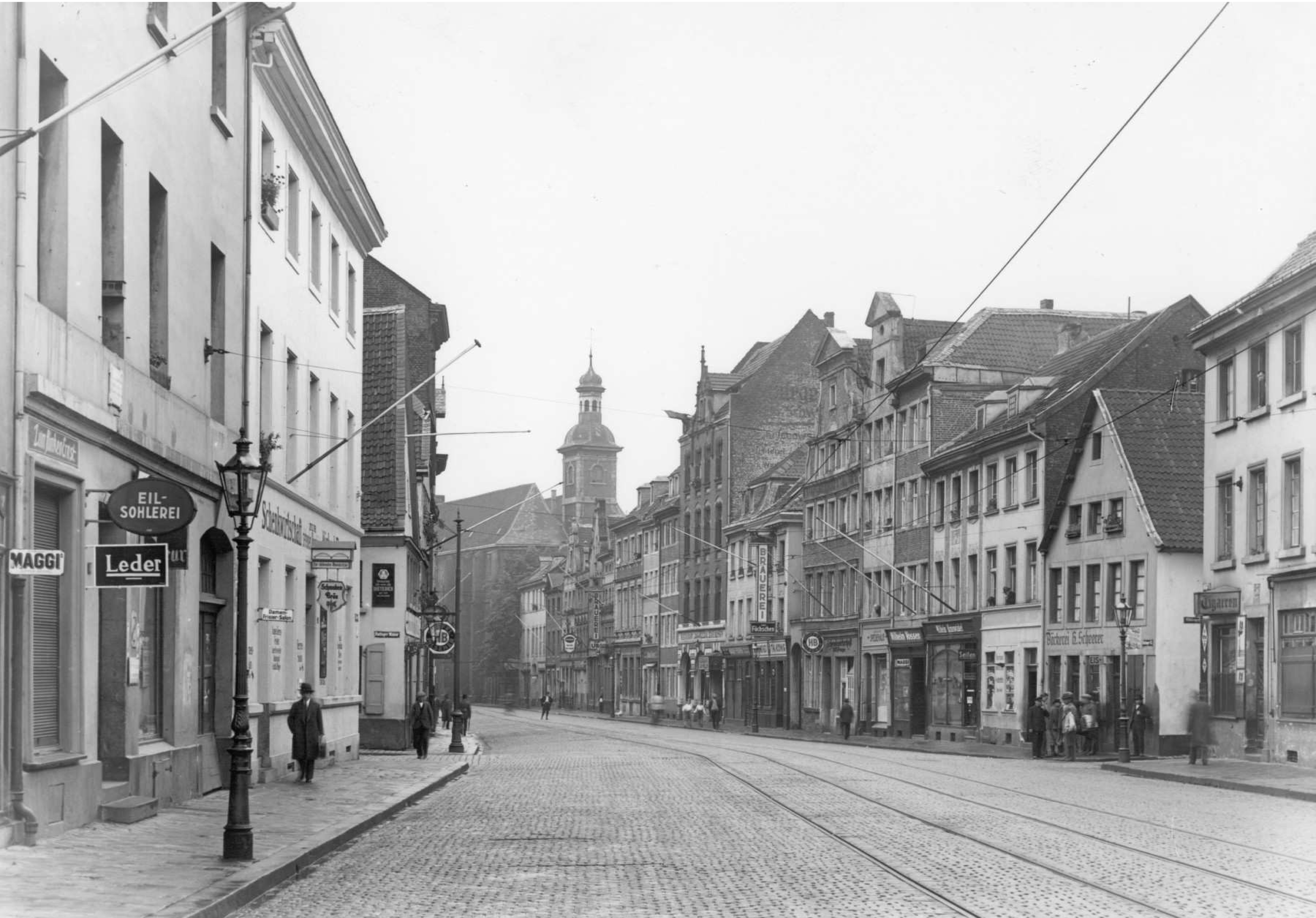 Ratinger Straße im Jahr um 1920 mit Blick nach Westen. Vorne links die Einmündung der Ratinger Mauer mit dem ersten Haus Nr. 45, rechts die Einmündung der Mühlengasse. Im Hintergrund die Kreuzherrenkirche.